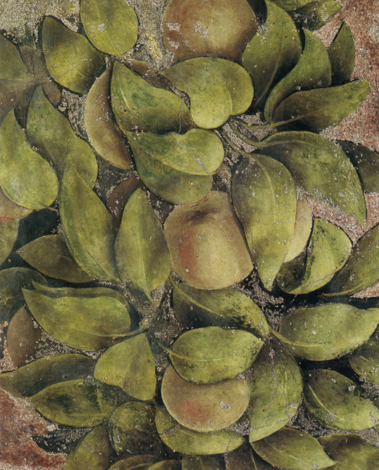 LEONARDO da Vinci The Last Supper Mixed technique, 460 x 880 cm Convent of Santa Maria delle Grazie, Milan